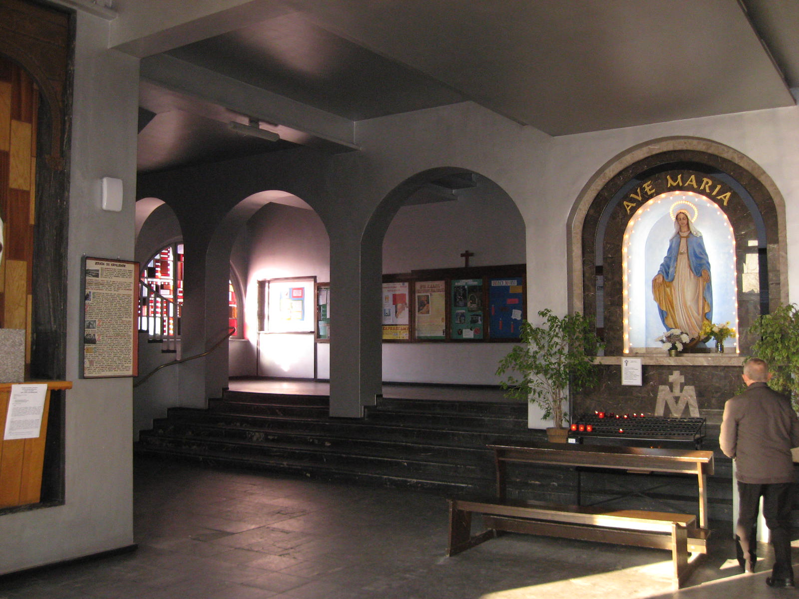 Kościół św. Kamila w Zabrzu